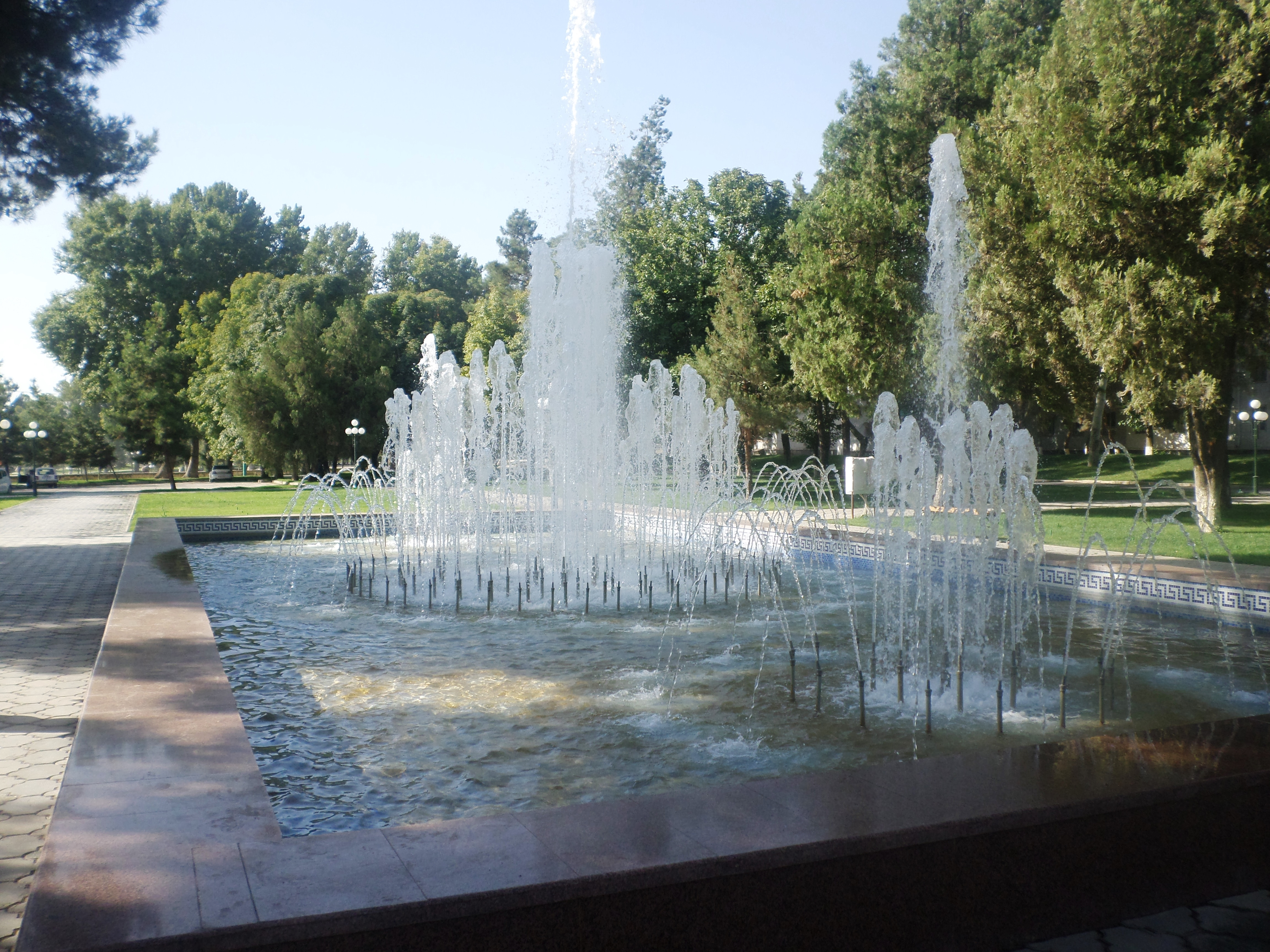 Фотан в г. Самарканде